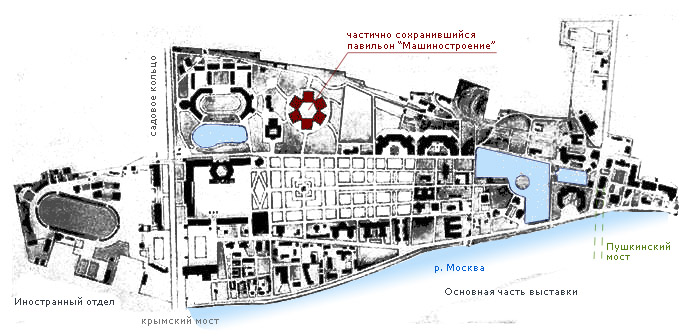 Генеральный план всероссийской сельскохозяйственной выставки 1923 года.